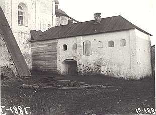 Домик келаря конец XIX века